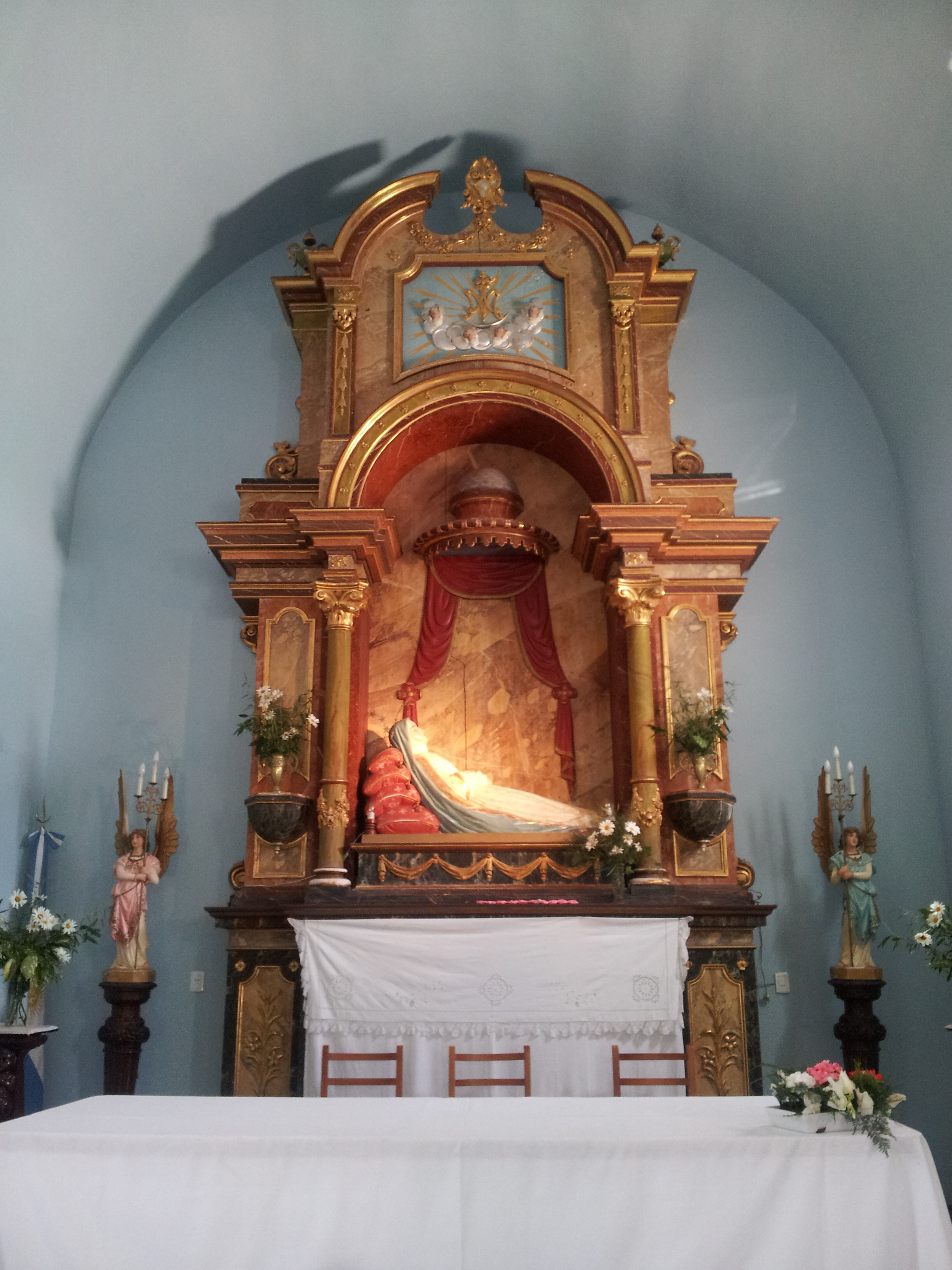 Vista de la Virgen del Transito, en el interior de la Parroquia Nuestra Señora del Transito en Saldungaray (Provincia de Buenos Aires)